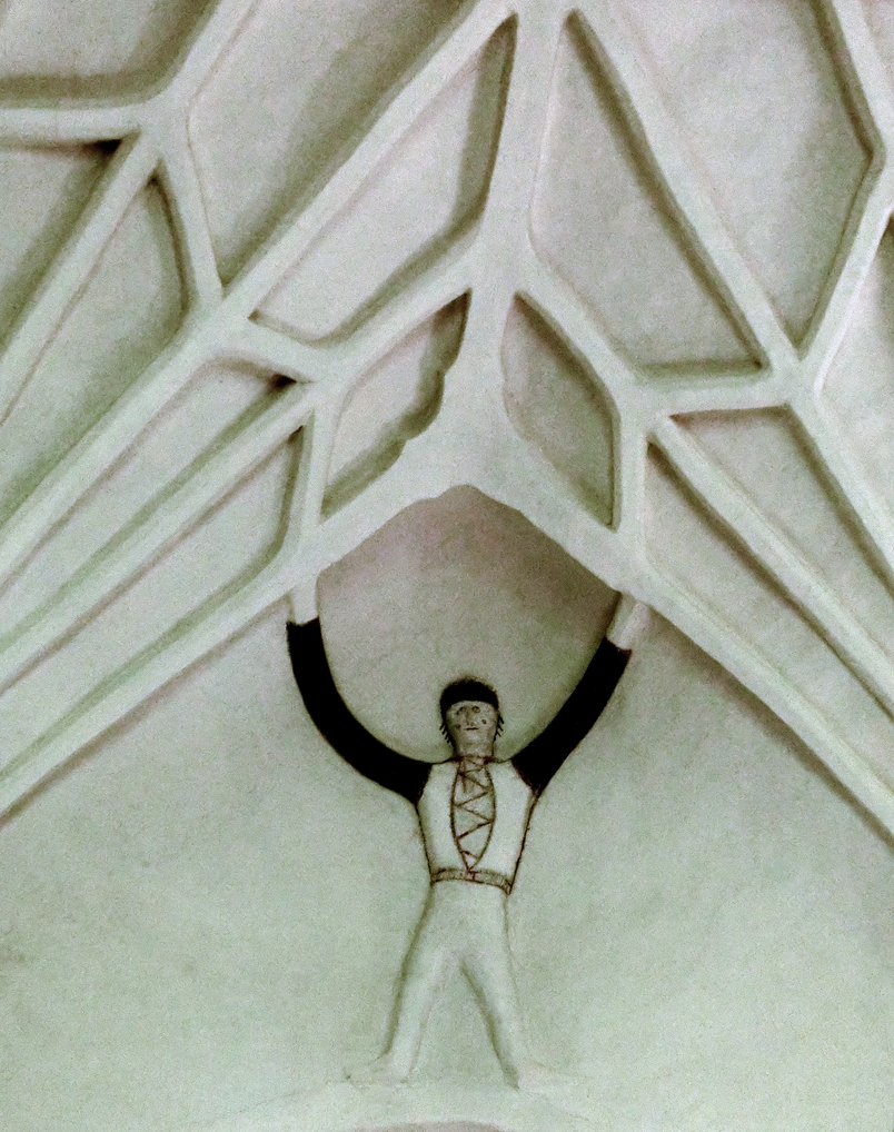 Enåkers kyrka i Enåkers socken, Heby kommun, Uppsala län, Uppland, Uppsala ärkestift, Sverige.